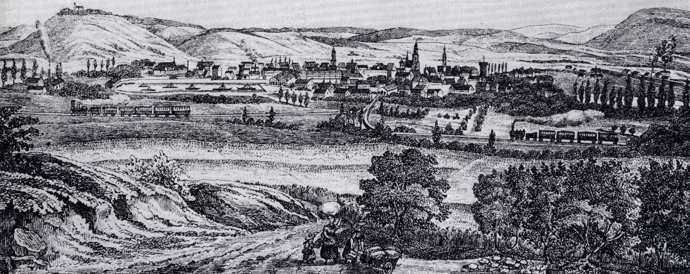 Eisenbahnen in Heilbronn. Lithografie.